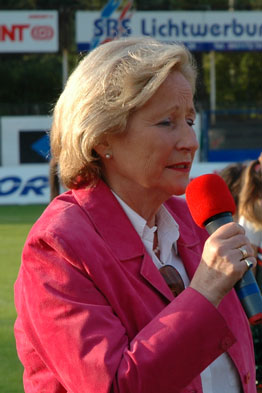 Kiels Oberbürgermeisterin Angelika Volquartz